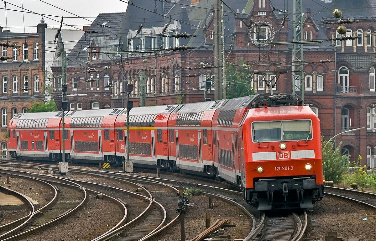 120 201-9 (DB-Baureihe 120.2, umgezeichnete 120 116-9) fährt mit dem Regionalexpress (RE) 33006 Rostock–Hamburg („Hanse-Express“) in den Hamburger Hauptbahnhof ein.